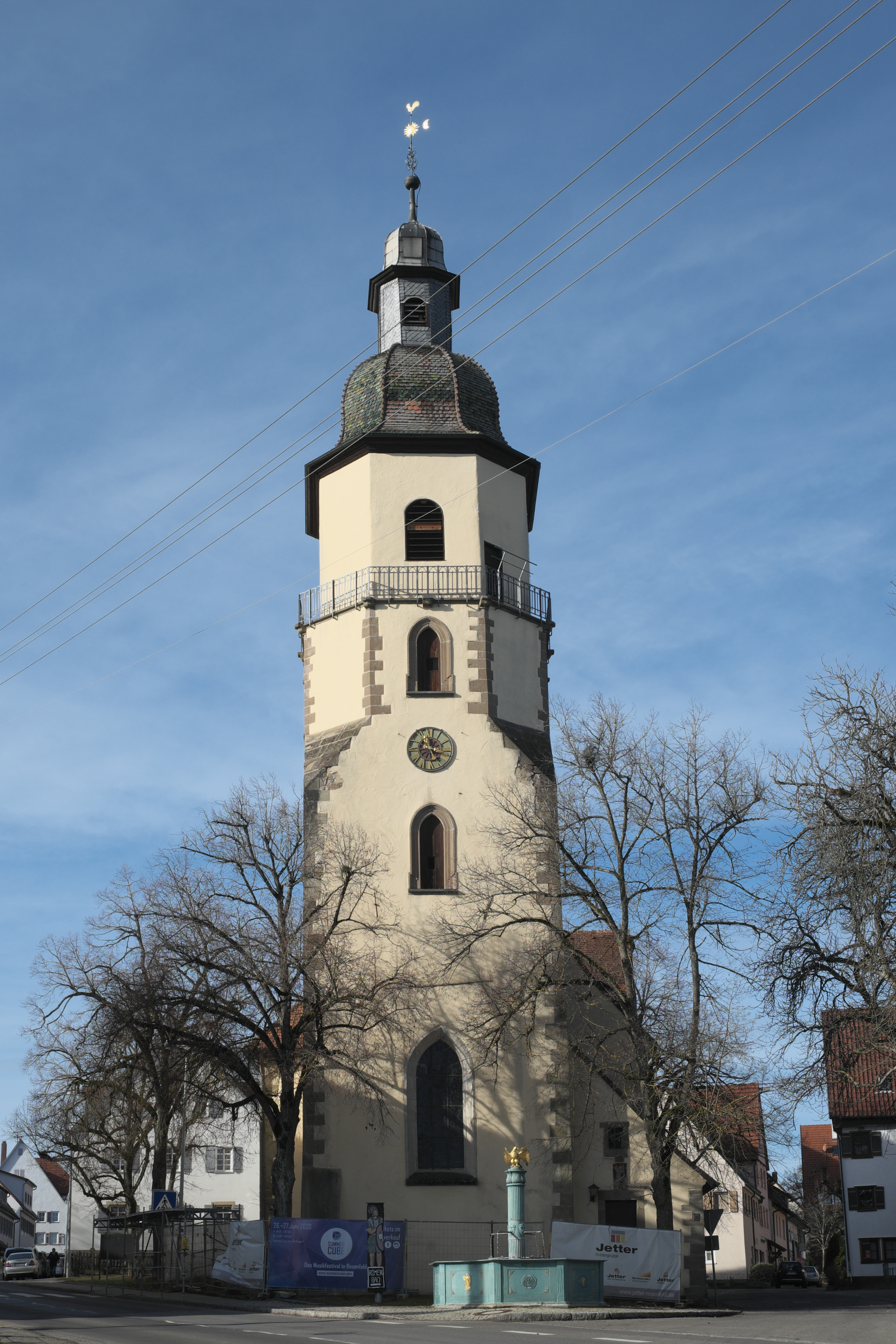 Evangelische Stadtkirche in Rosenfeld im Zollernalbkreis (Baden-Württemberg/Deutschland)